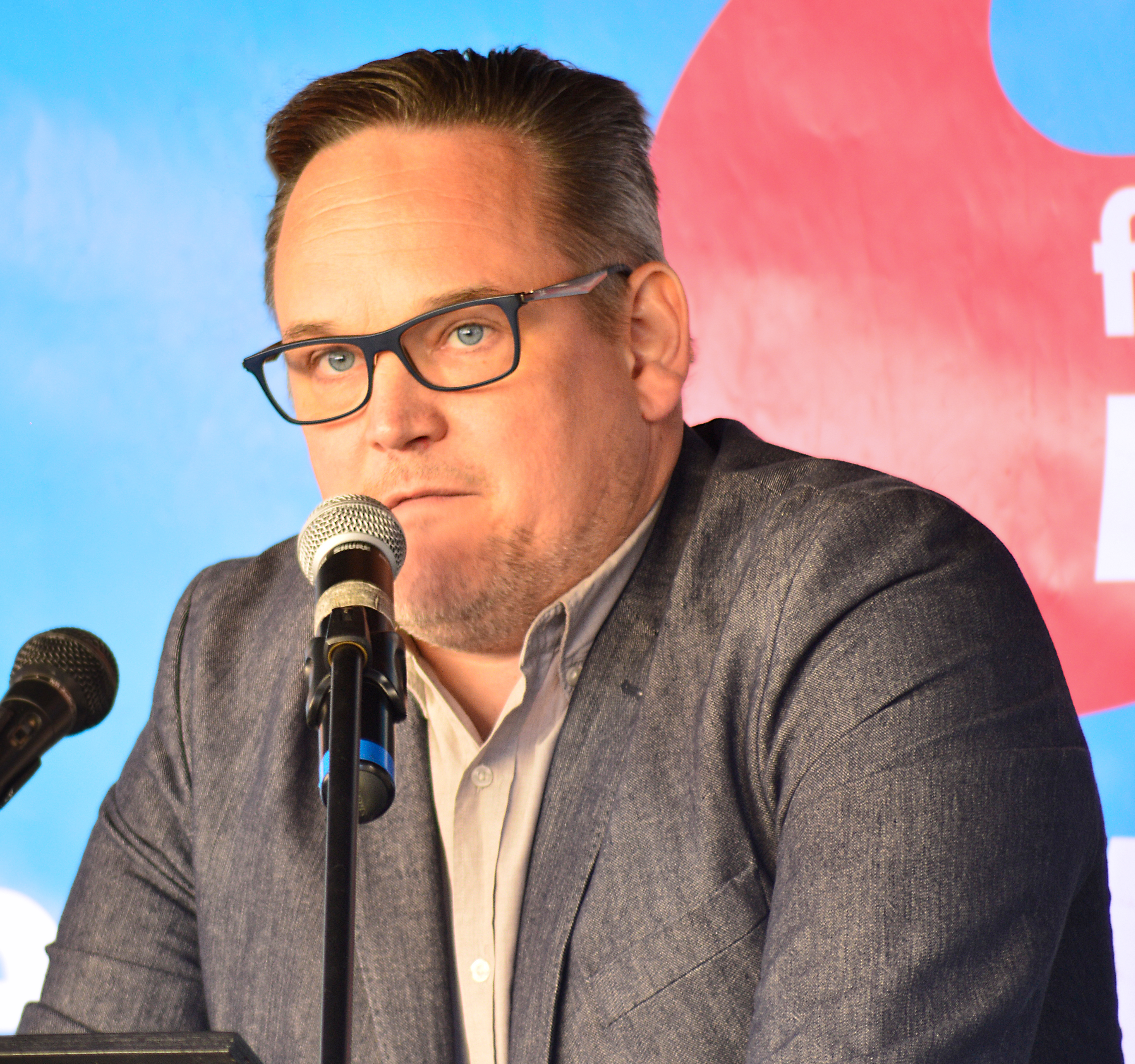 Martin Reichardt (AfD) spricht auf einer Kundgebung.